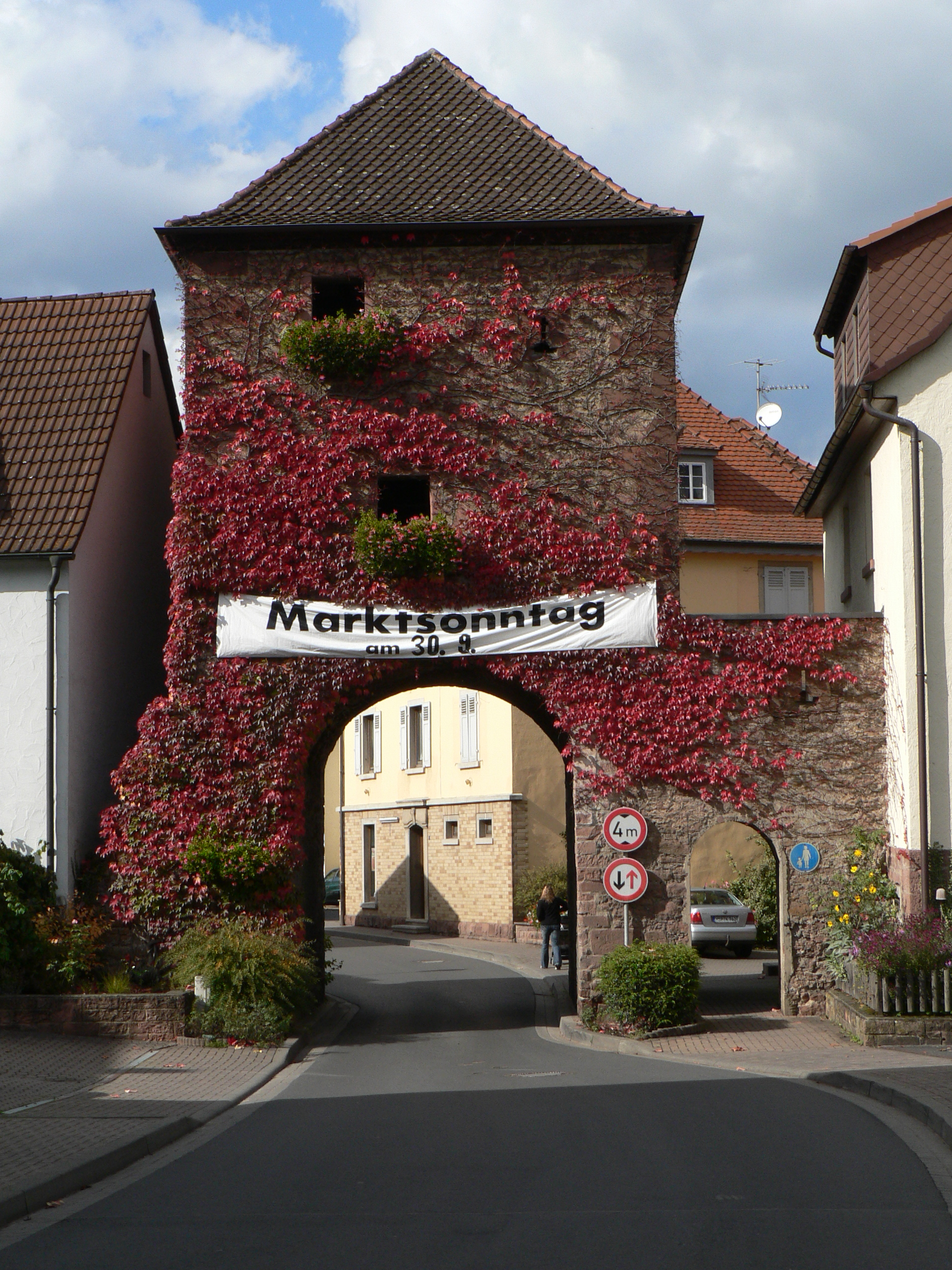 Stadttor von Burgsinn